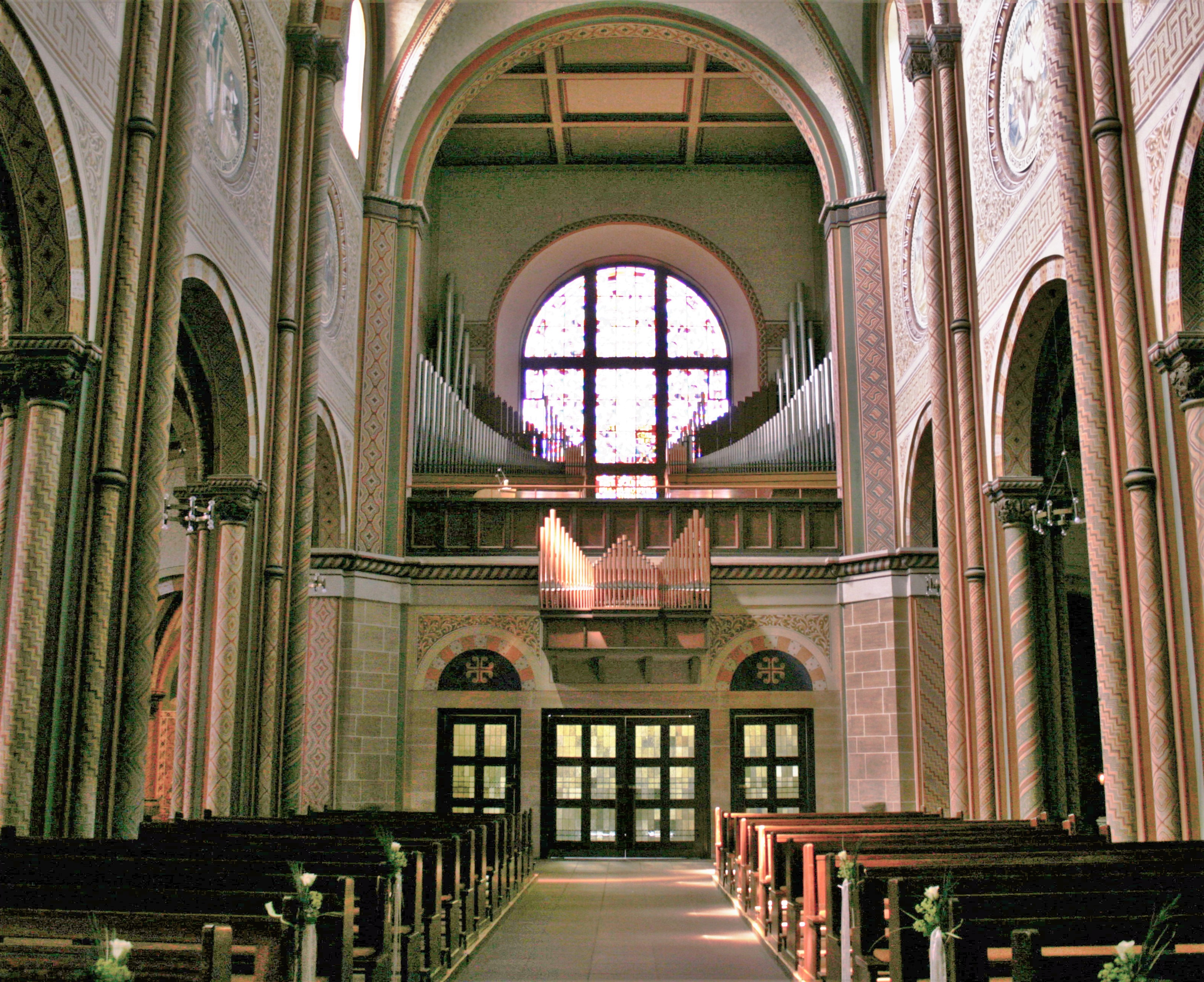 St. Pankratius in Anholt, Isselburg